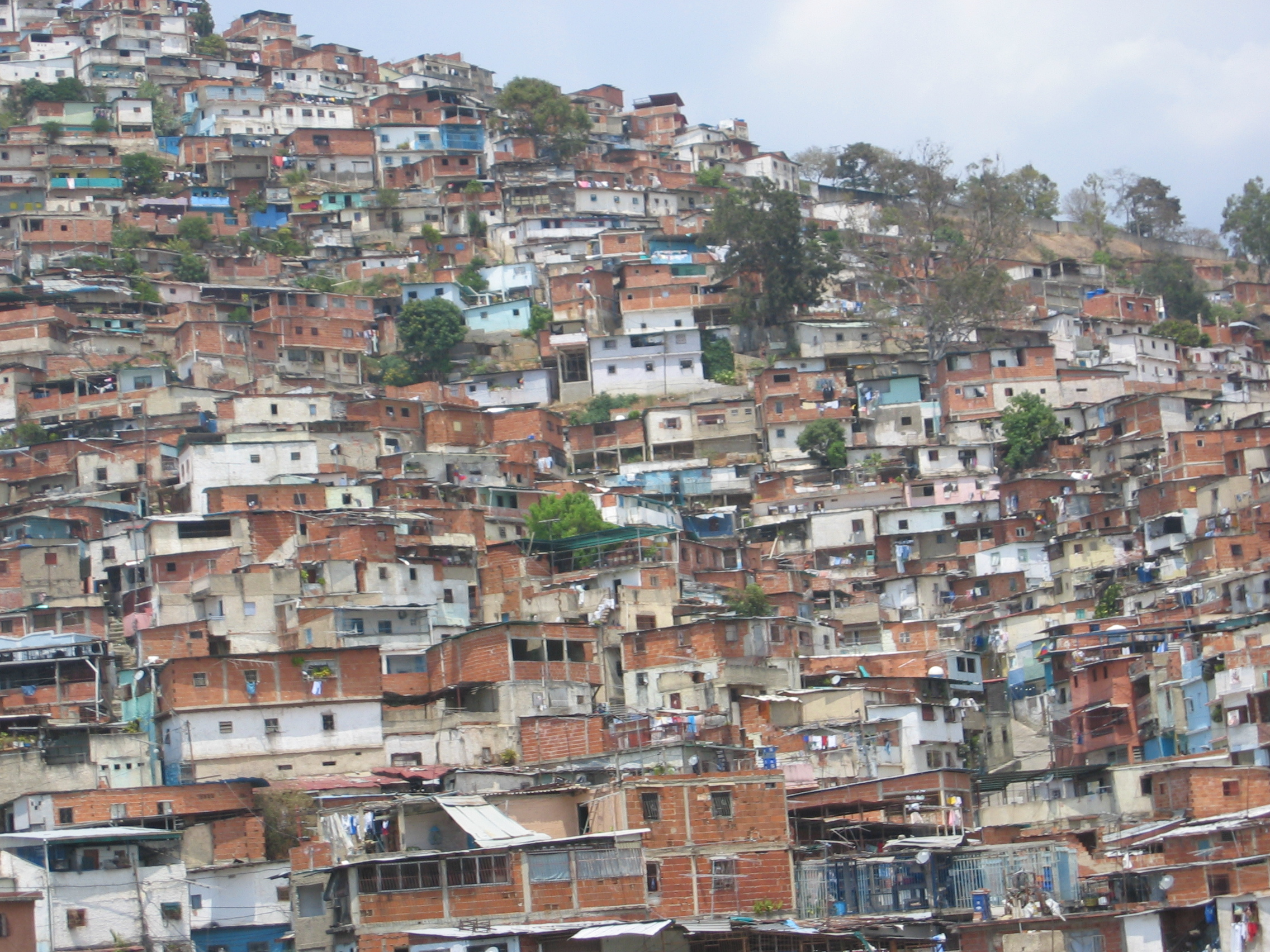 Dense hillside development in Caracas, Venezuela